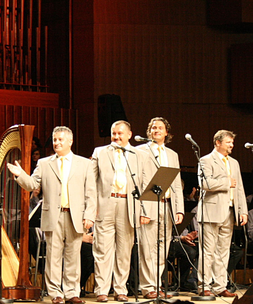 Dobrotvorni koncert "Križ nek' ti sačuva ime" u koncertnoj dvorani Vatroslav Lisinski u Zagrebu.